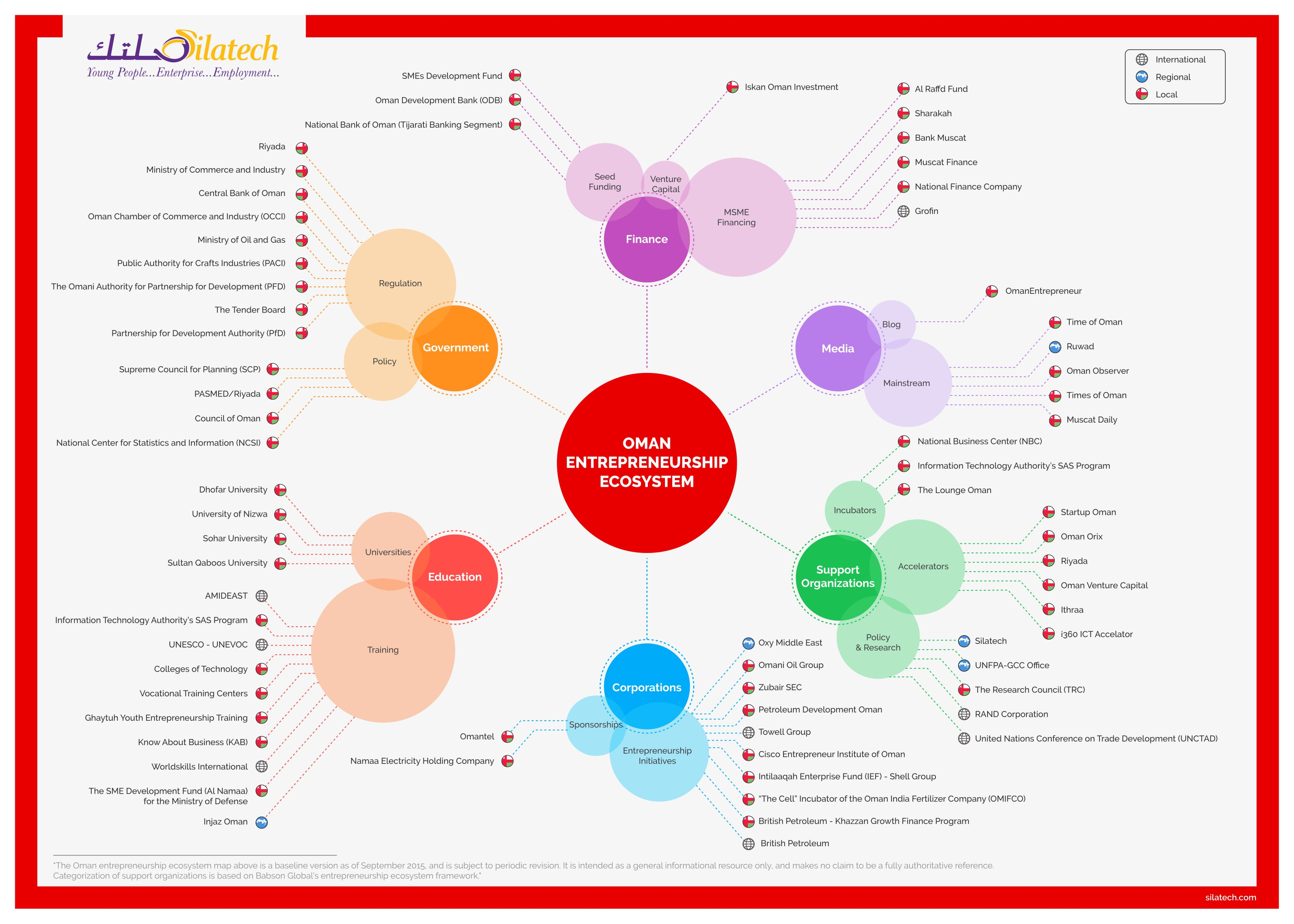 صُمّمت خريطة منظومة ريادة الأعمال في سلطنة عُمان لتكون أداة مفيدة وقيّمة بيد جميع روّاد الأعمال، ومنظّمات الدعم، وصناع القرار المشاركين في بيئة ريادة الأعمال في سلطنة عُمان. وهي تعرض العلاقة بين مختلف المنظمات والكيانات المشاركة في منظومة ريادة الأعمال في الدولة، سواء كانت مساهمتها من حيث التمويل أو التعليم أو دعم روّاد الأعمال أو القطاع الخاص أو الإعلام أو وضع السياسات. تخضع الخريطة للمراجعة الدورية، والغرض منها هو أن تكون مورداً إعلامياً عاماً فقط، وهي لا تزعم أنّها وثيقة مرجعية محكمة. يستند تصنيف منظمات الدعم على إطار بابسون غلوبال لبيئة ريادة الأعمال.